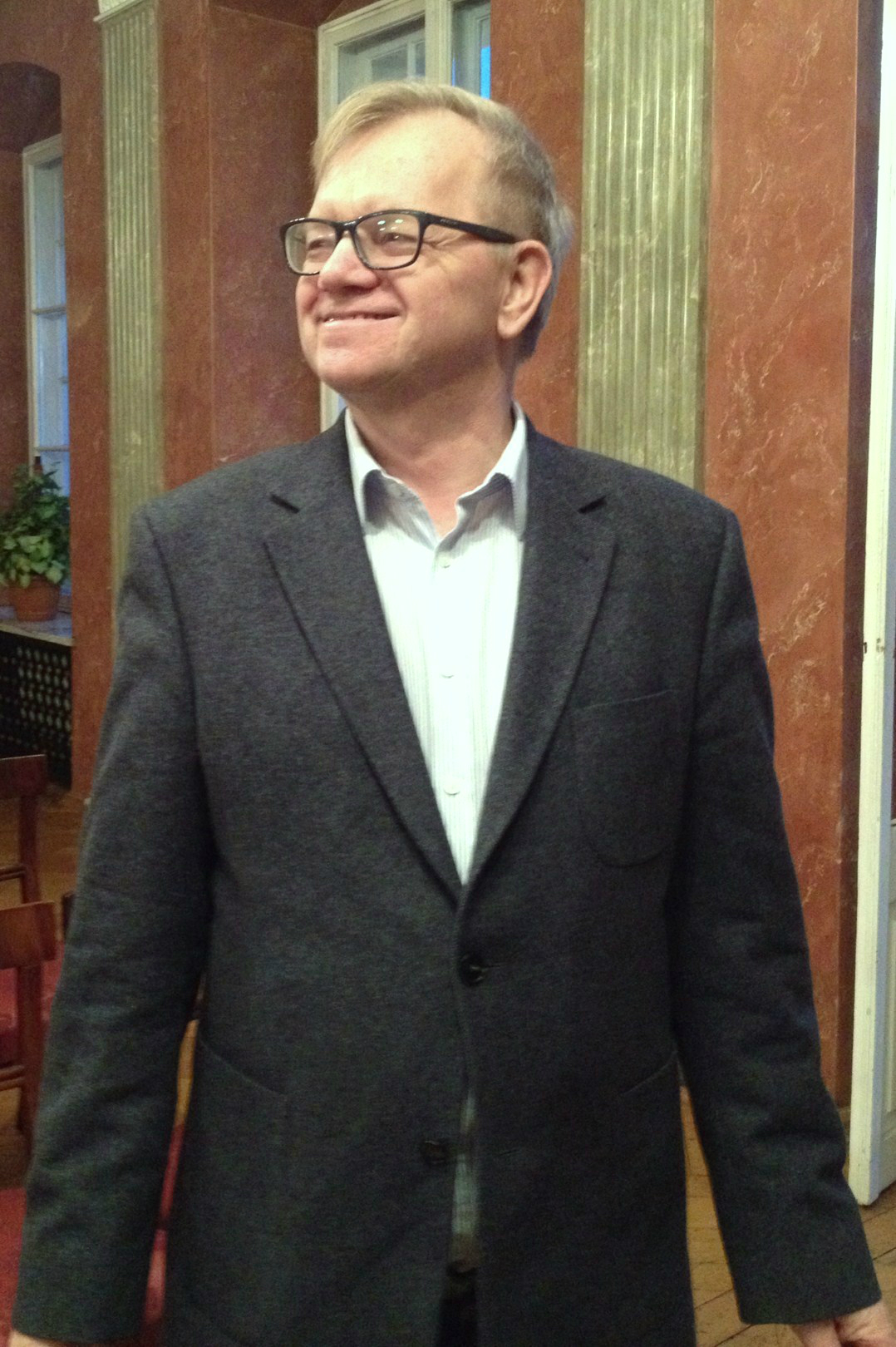 Prof. Tomasz Jasiński, historyk (mediewista).